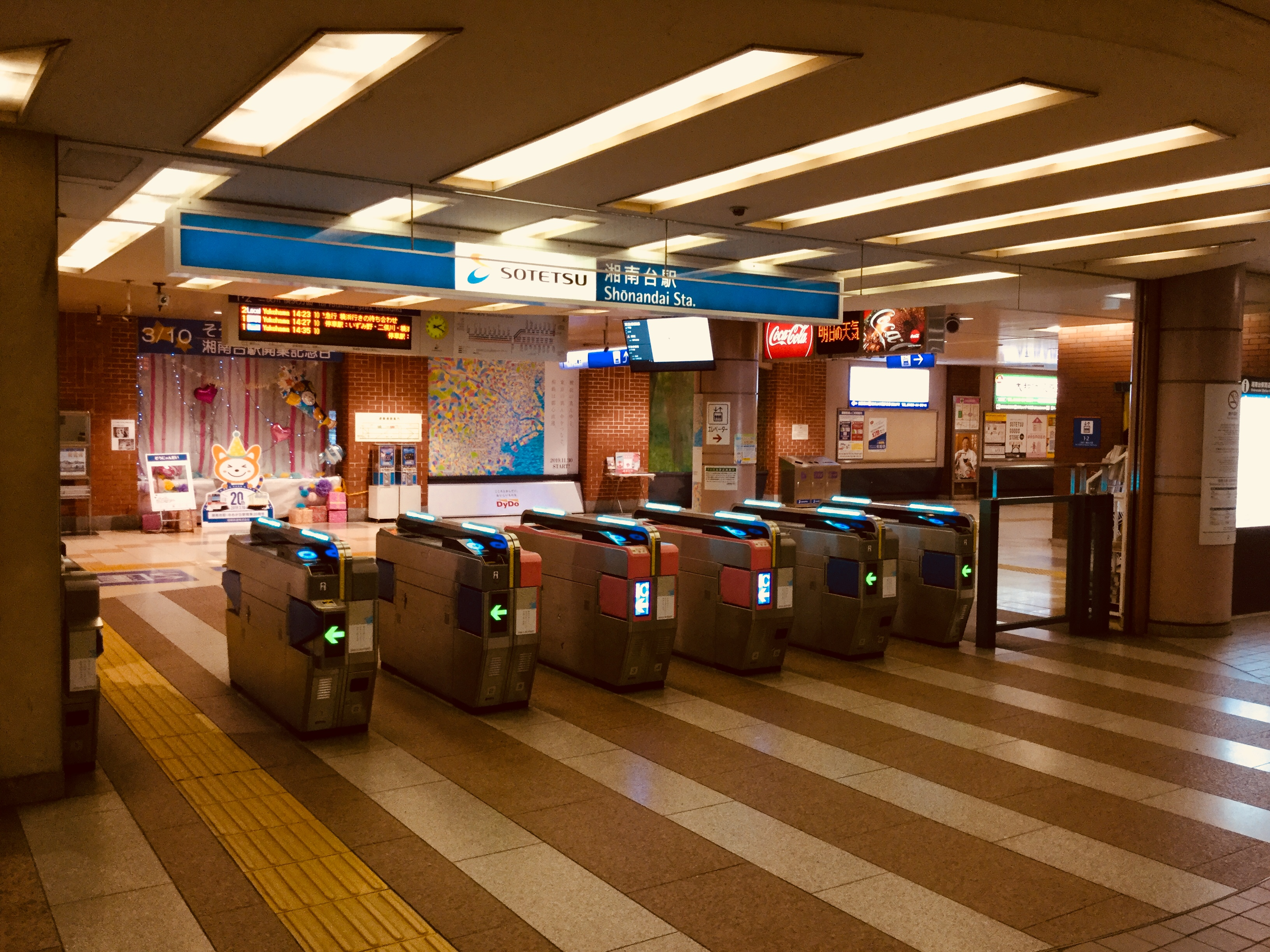 湘南台駅の相鉄いずみ野線改札